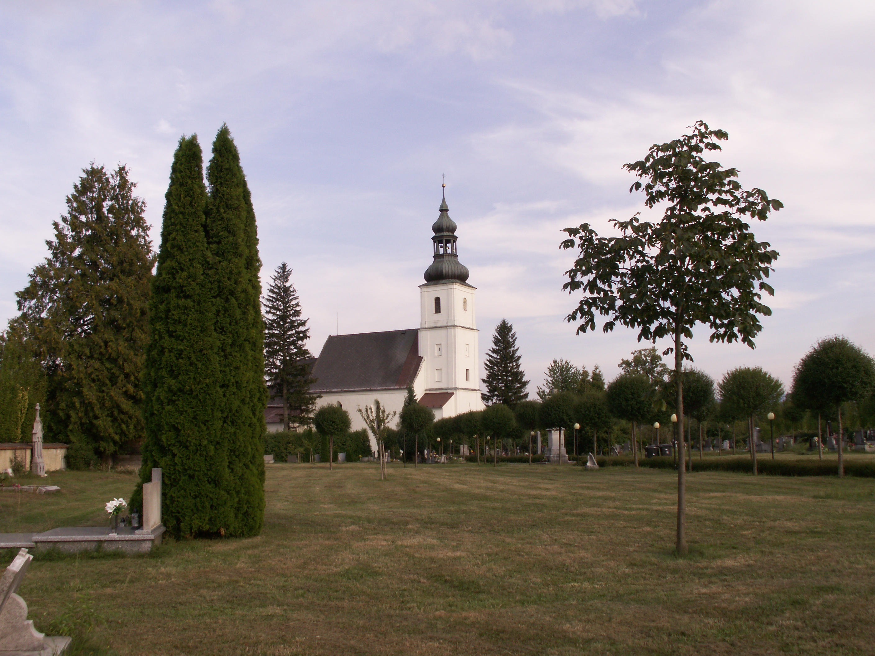 Bernartice, okres Jeseník, kostel sv. Petra a Pavla s přilehlým hřbitovem